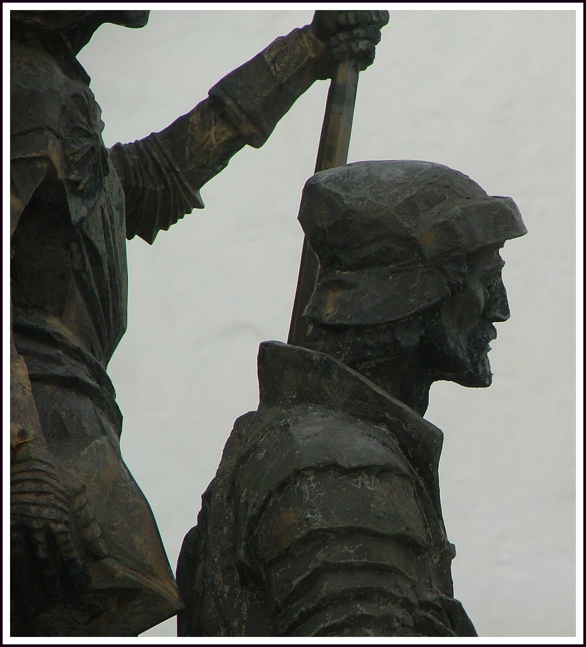 Schloss Zeil, Bronze-Kopf der Figur von Wilhelm dem Älteren, der 1526 Reichserbtruchsess wurde und Statthalter von Württemberg war, Brunnen-Figur im Innenhof von Schloss Zeil